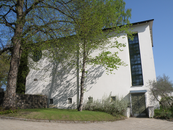 Erik Bryggmanin piirtämä esifunktionalistinen rakennus valmistui 1930.